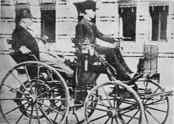 Uno de los primeros automóviles en Guatemala. Publicada en 1897